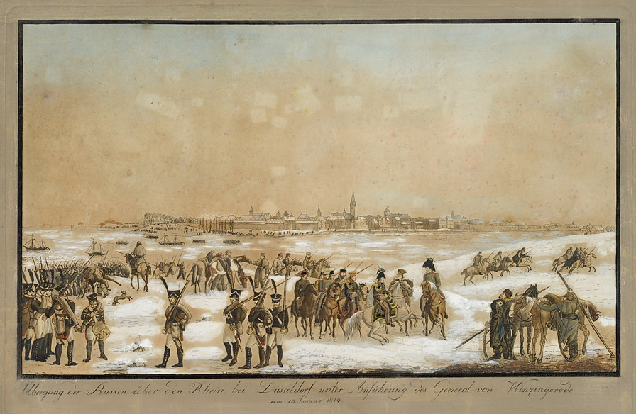 Übergang der Russen über den Rhein bei Düsseldorf unter Anführung des Generals von Winzingerode am 13. Januar 1814. Handkolorierte Radierung. Gesamtgröße 48 x 67 cm (hier auf das Bildmotiv beschnitten). Düsseldorfer Schule um 1815